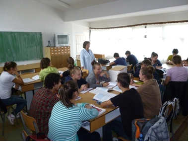 Библиотеката на училиштето.